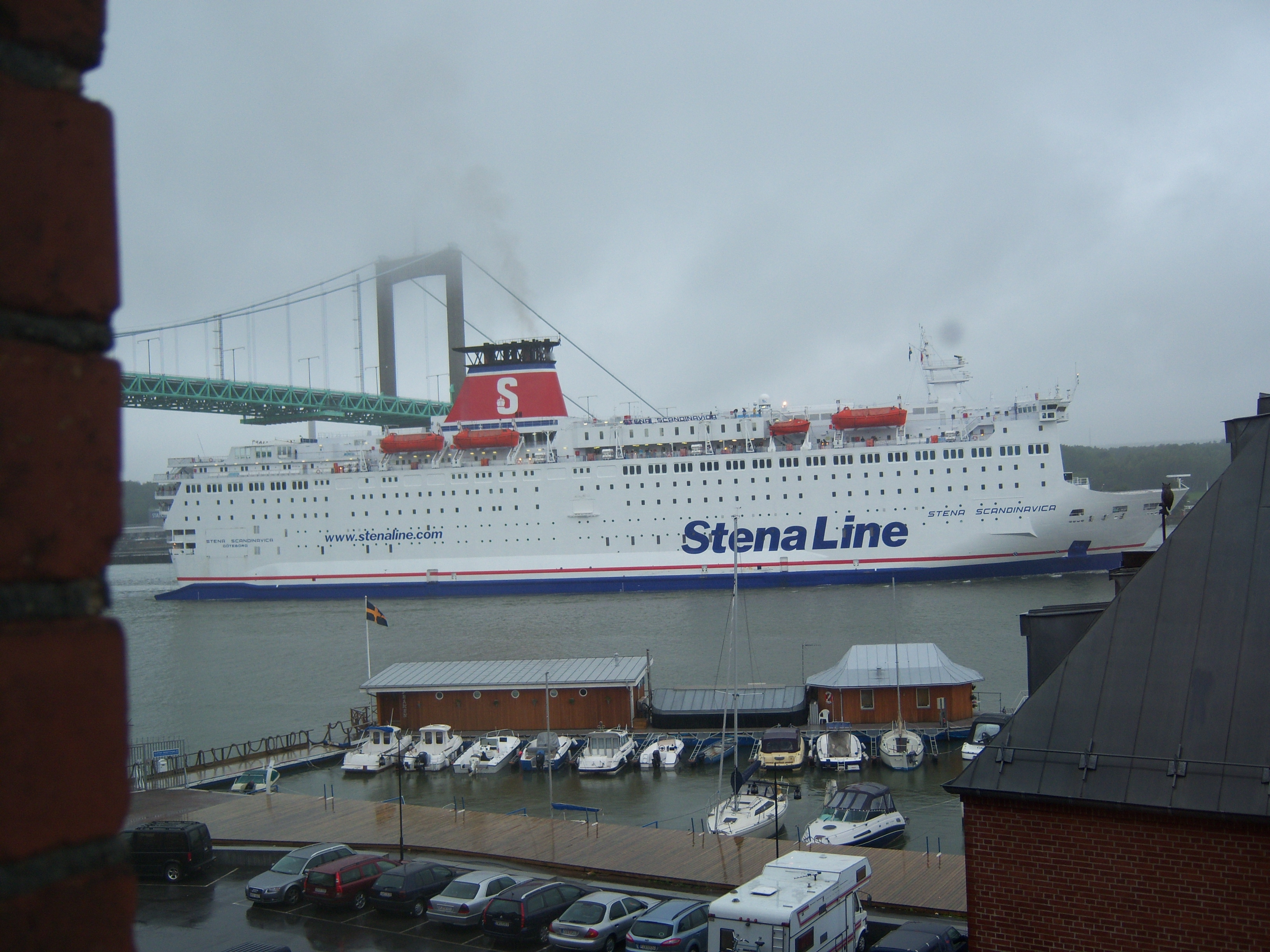 De Stena Scandinavica bij aankomst in Goteborg.